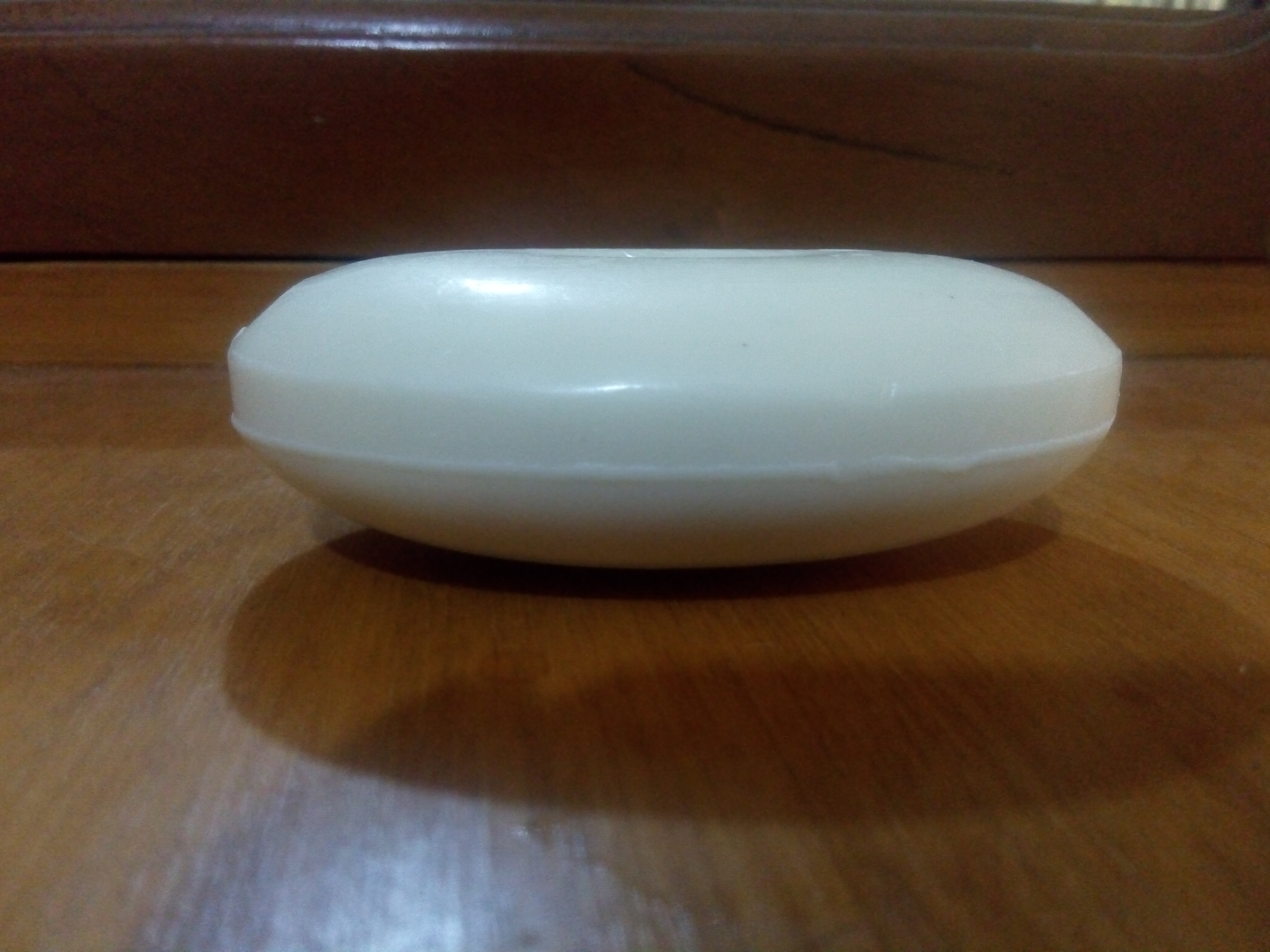 Los jabones hechos con azufre contienen propiedades naturales que son aptas para la piel humana.